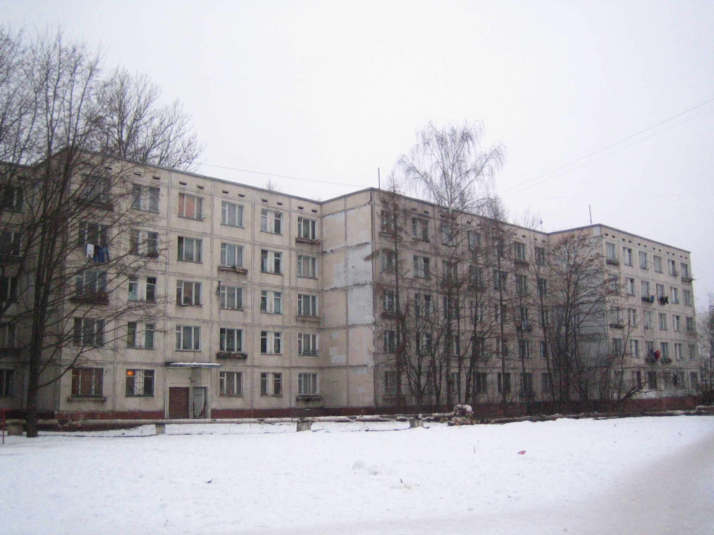 II-32 с маломерными квартирами